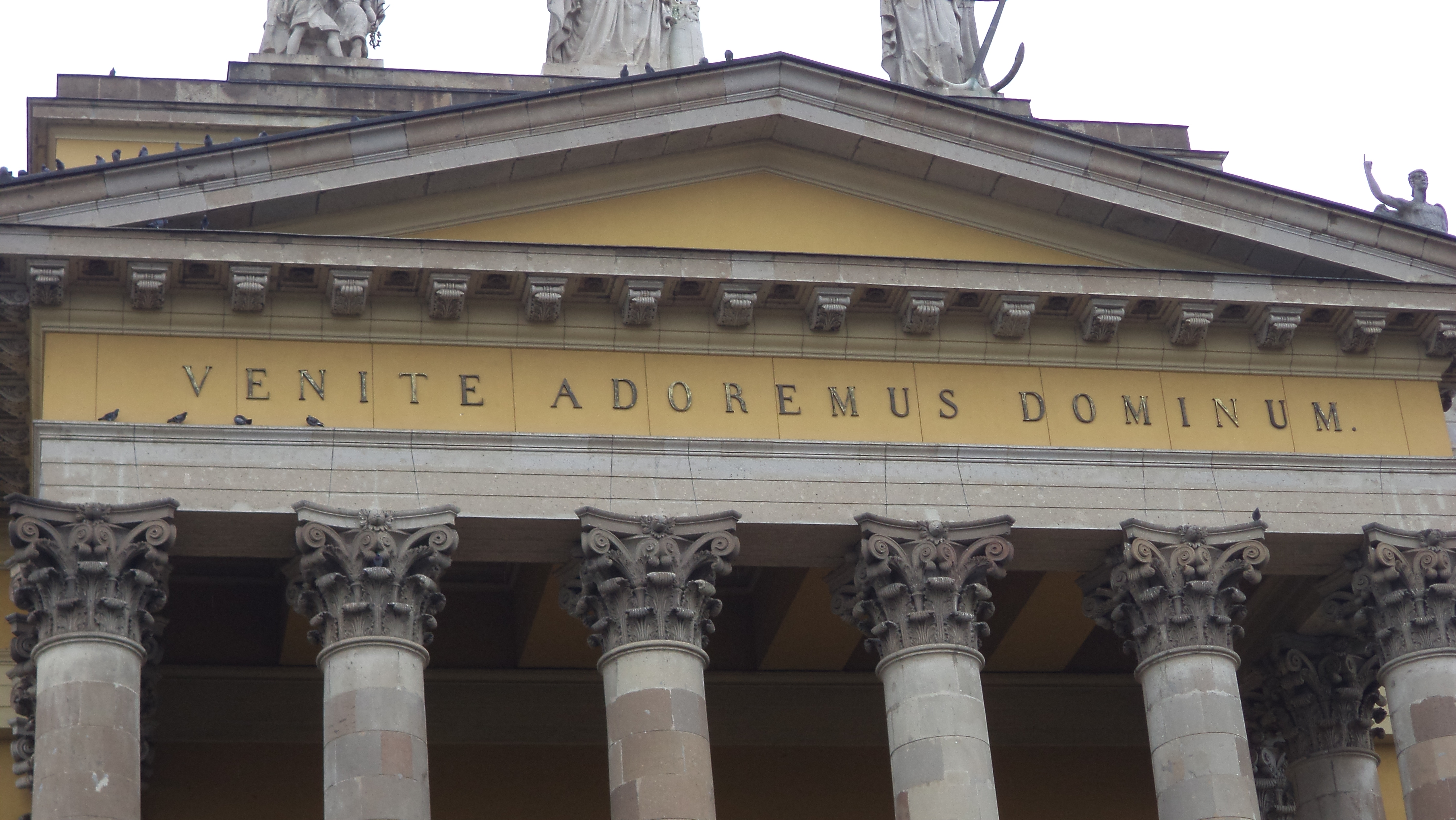 Az Egri főszékesegyház bejárata feletti latin felirat